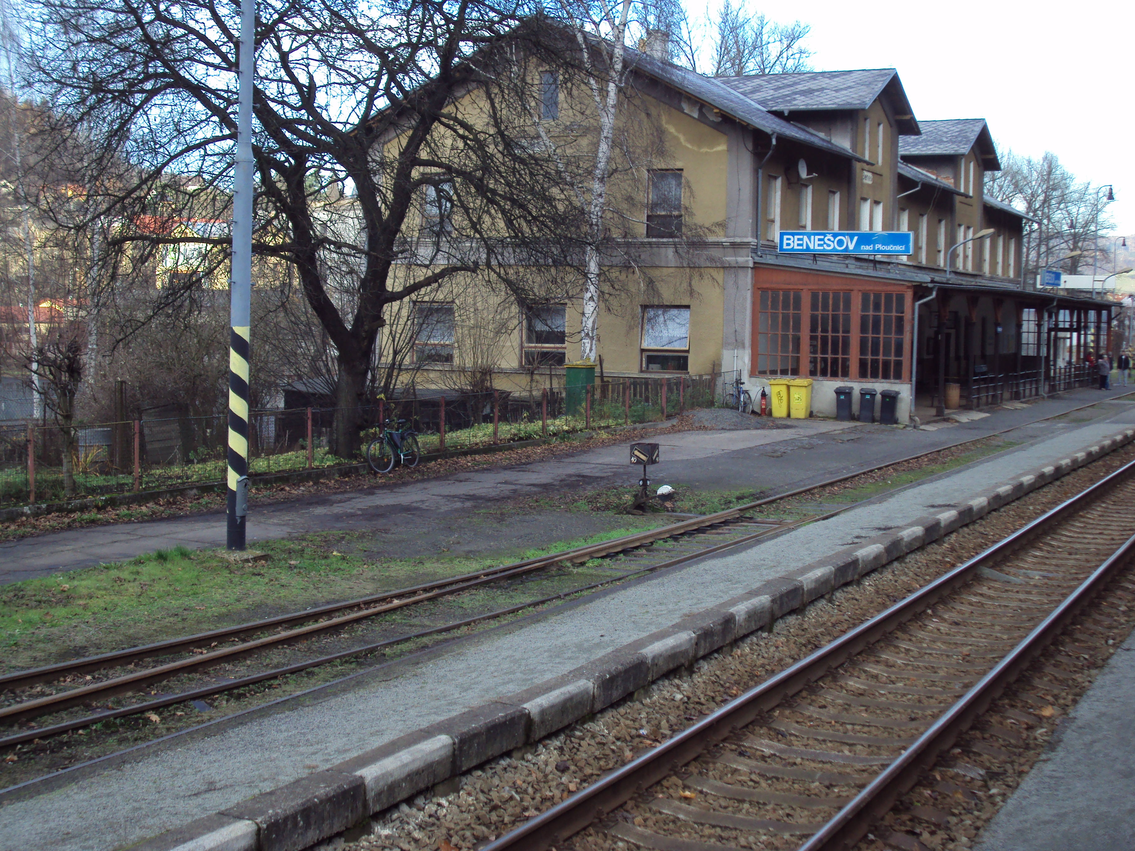 Železniční stanice v Benešově nad Ploučnicí